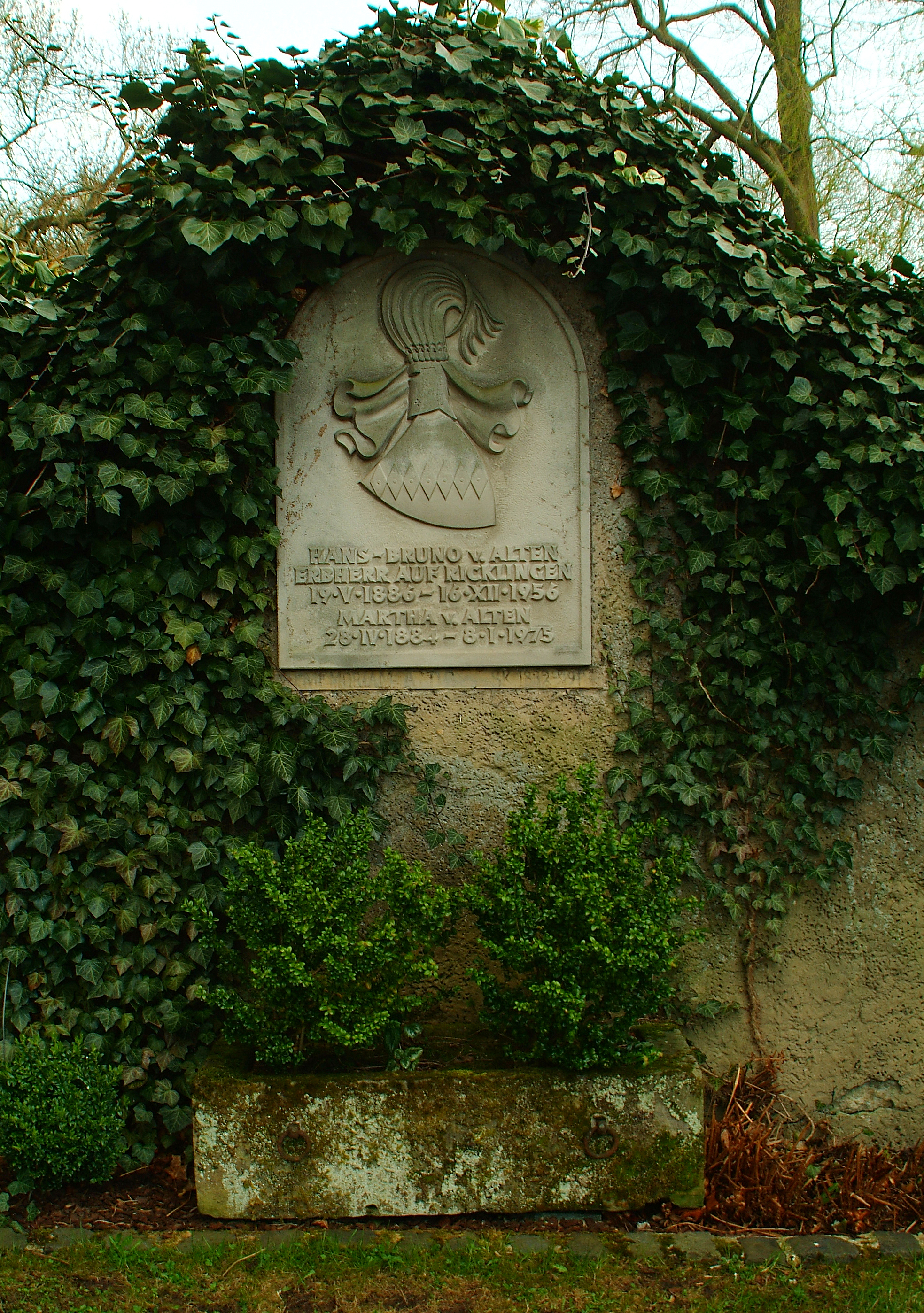 Sie haben ein besseres Bild? Sogar ein historisches Dokument als Bild(ungsförderung)? Zeigen Sie' s uns. Stiften Sie es, allen Menschen.